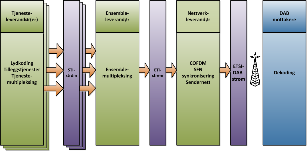 Eksempel på DAB-nettverk